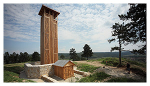 A szendrői várhegyen a vár egykori lőportornya helyén épült meg a HISTÓRIA VÖLGY projekt keretén belül 2012 évben a Farkas Pál által tervezett 25 m magas, faszerkezetes kilátótorony,a Szendrő - Felsővár kilátó. [1]